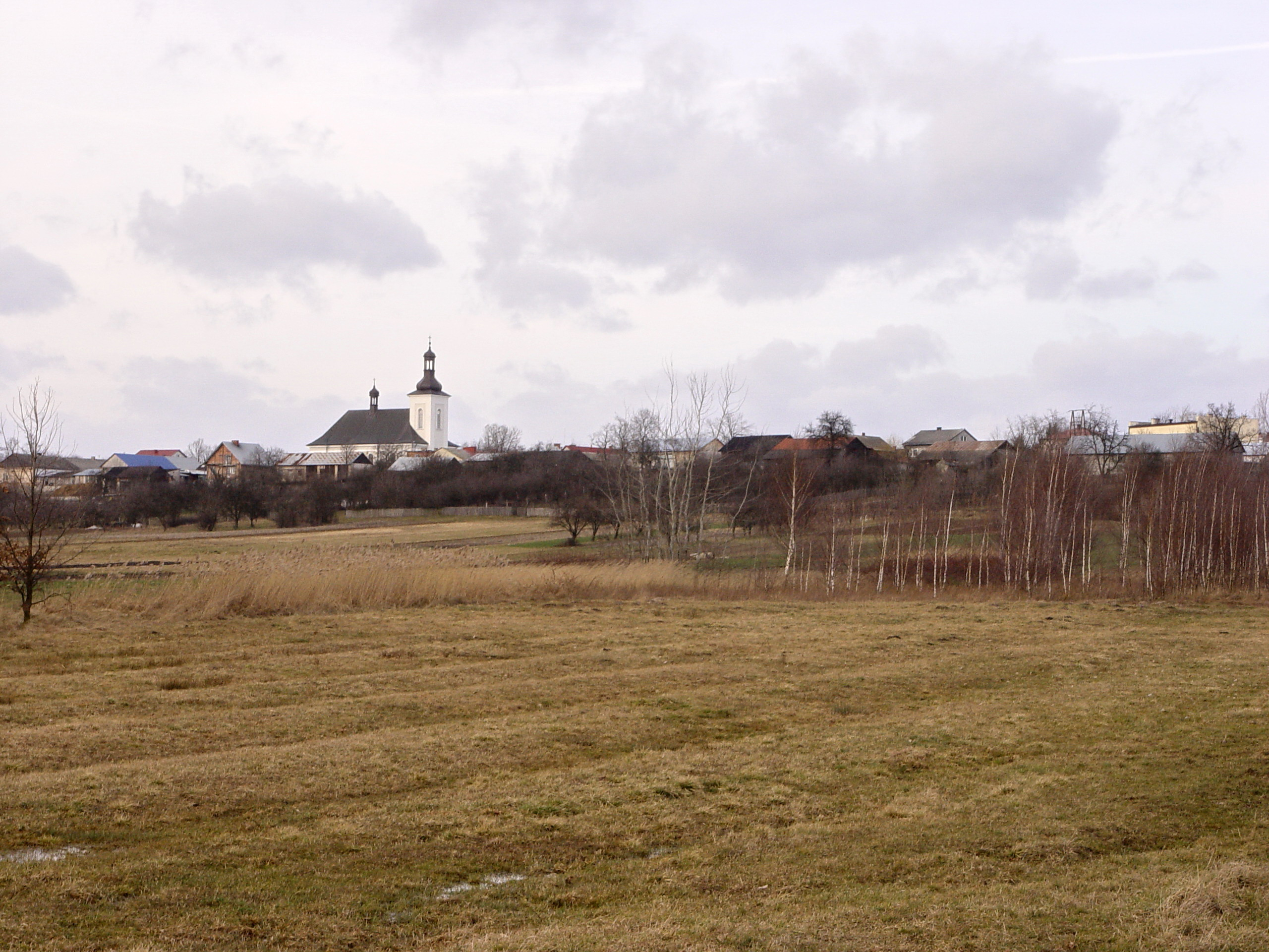 Balice, widok od południa, dominuje Kościół Św. Stanisława b.m.(WikiMapia kamerapunkt